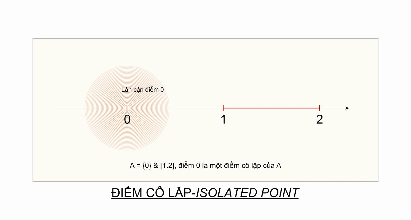 Điểm cô lập-Isolated point